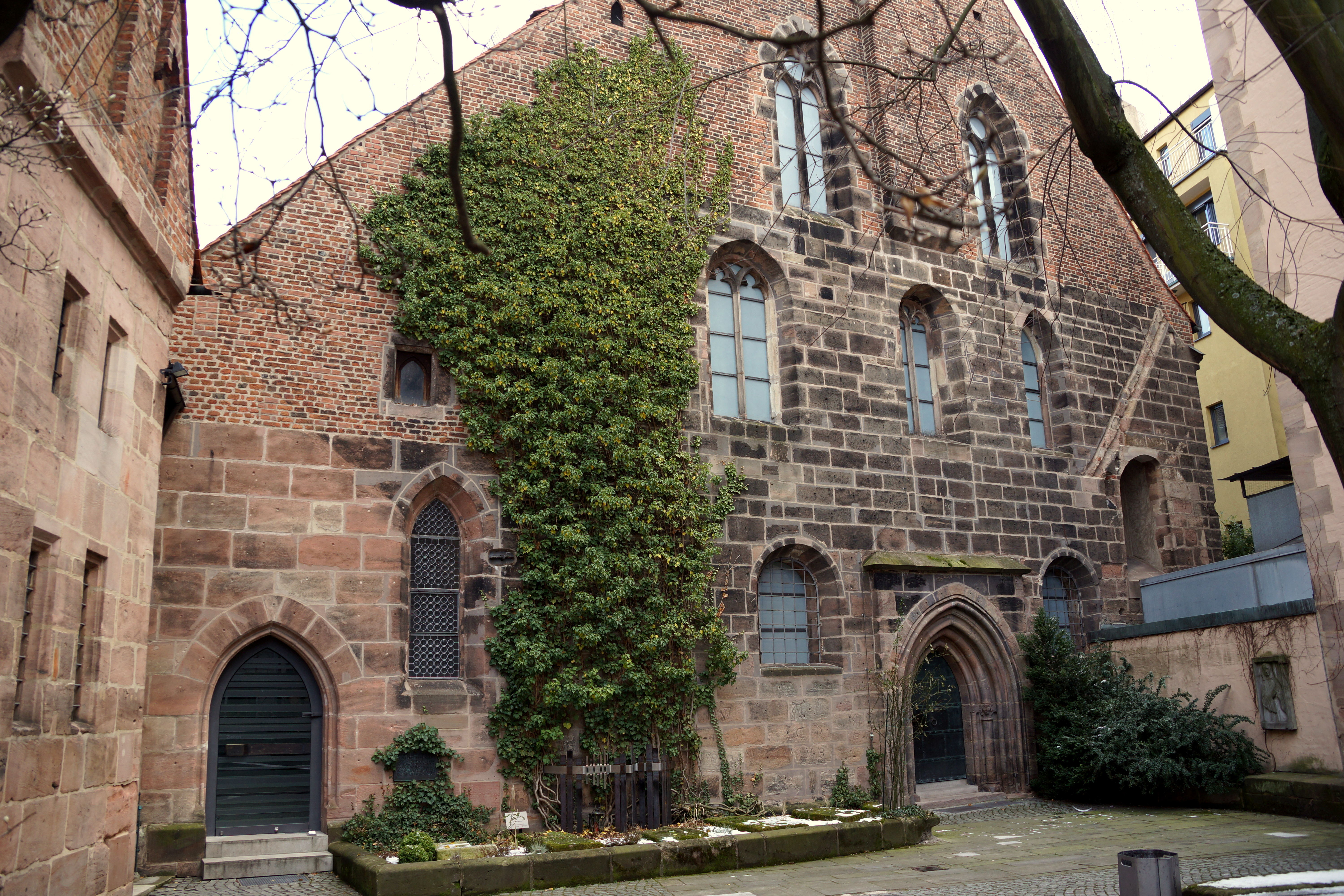 St. Klara, ehemalige Klosterkirche, in der Nürnberger Königsstraße